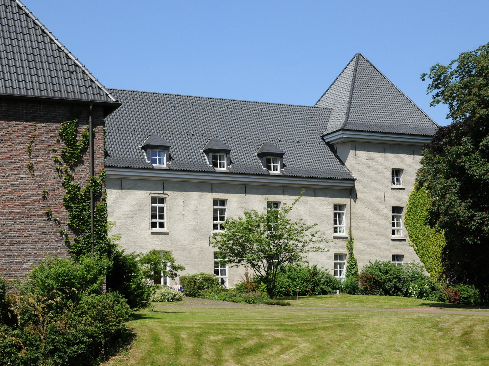 Verbliebener Flügel der Hauptburg von Haus Winnenthal in Xanten-Birten